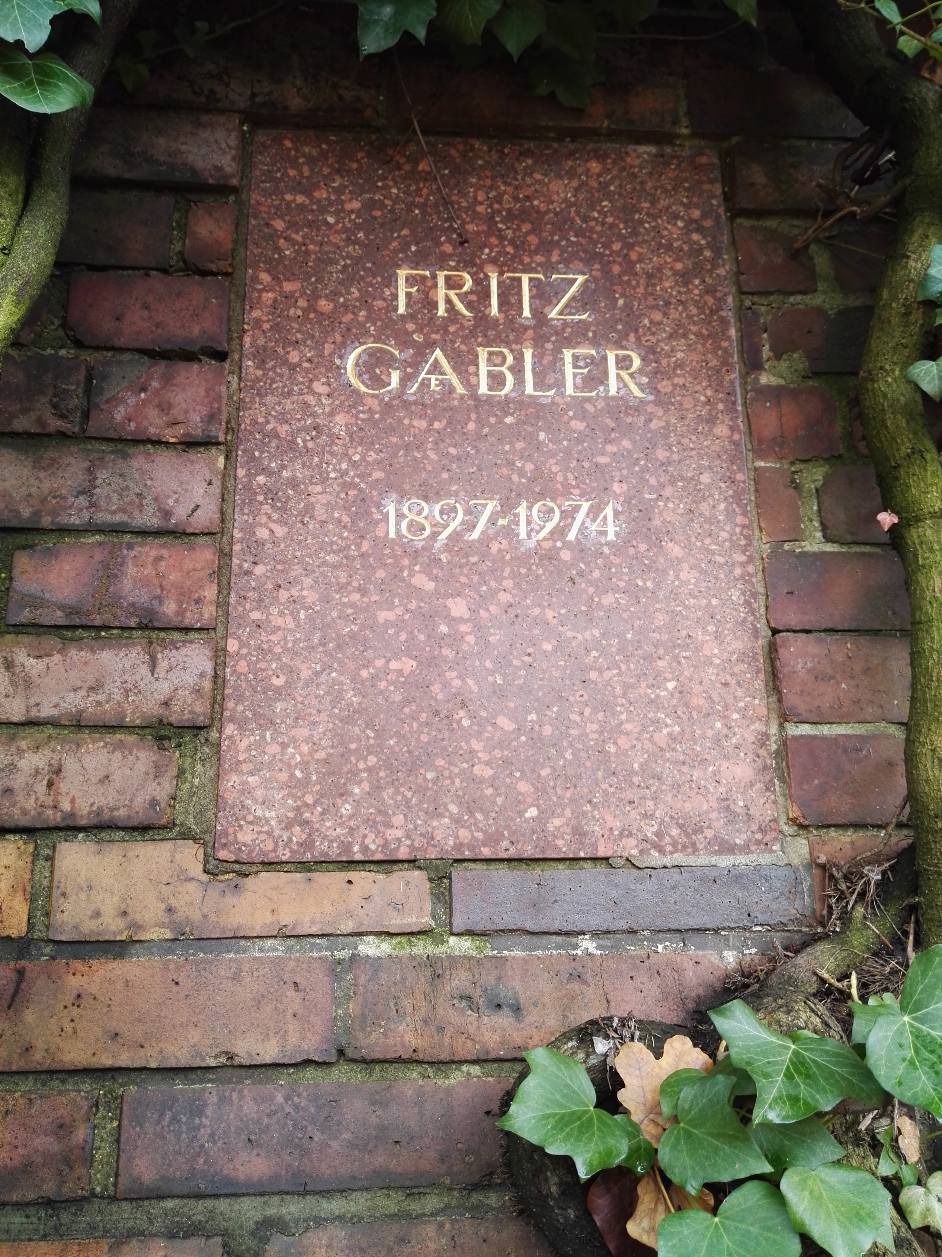 Grab von Fritz Gäbler in der Gedenkstätte der Sozialisten auf dem Zentralfriedhof Friedrichsfelde in Berlin-Lichtenberg